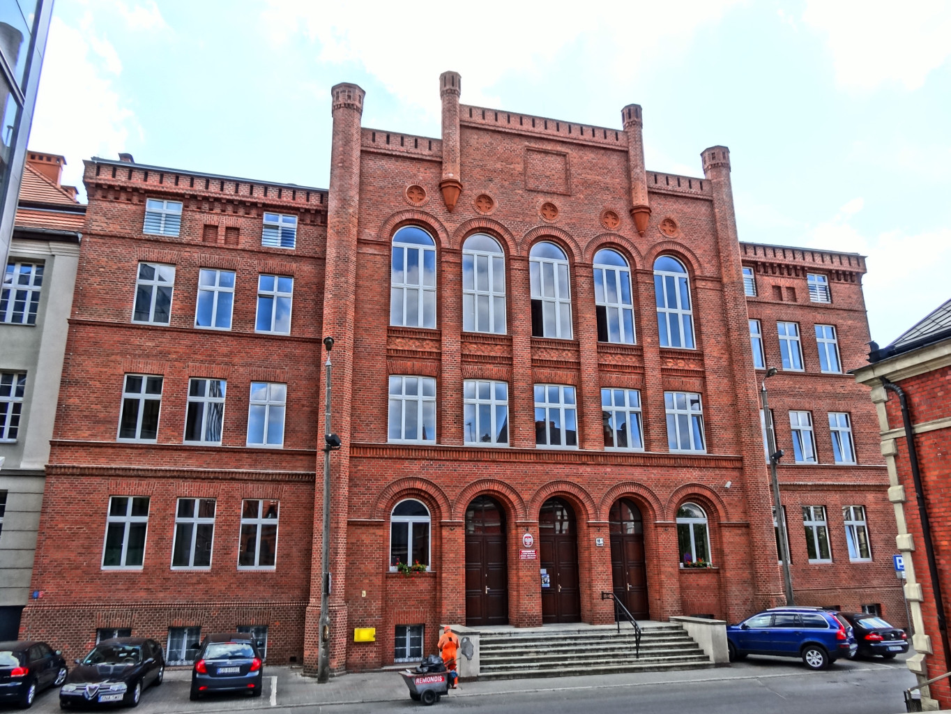 Budynek Seminarium Duchownego w Bydgoszczy, 1858 r.